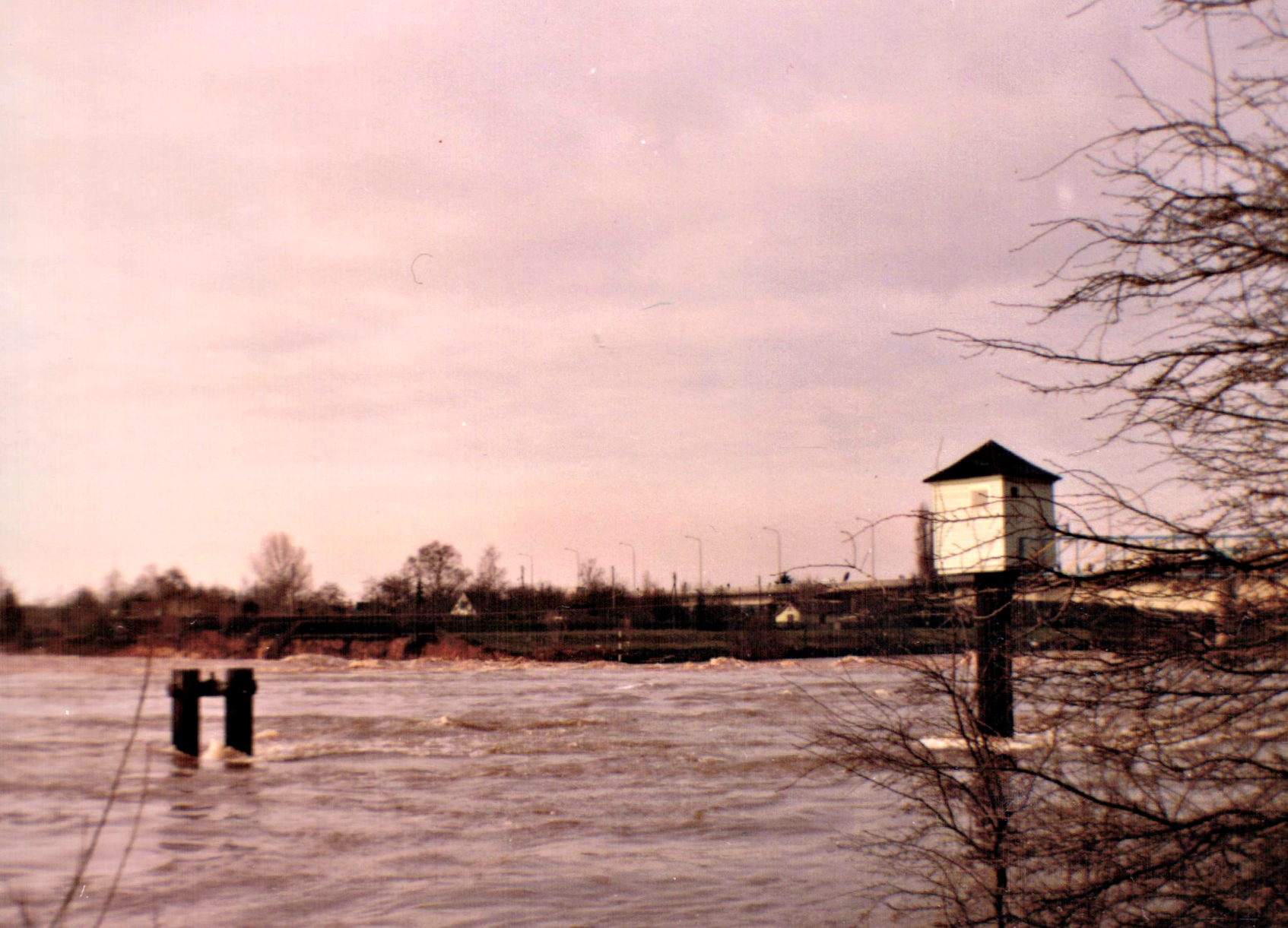 Weserdurchbruch 1981, Blick von Hastedt